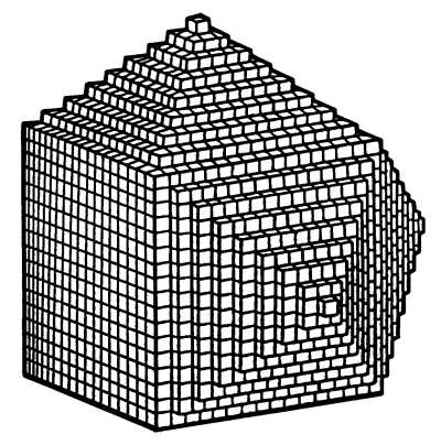 Construction de Hauy